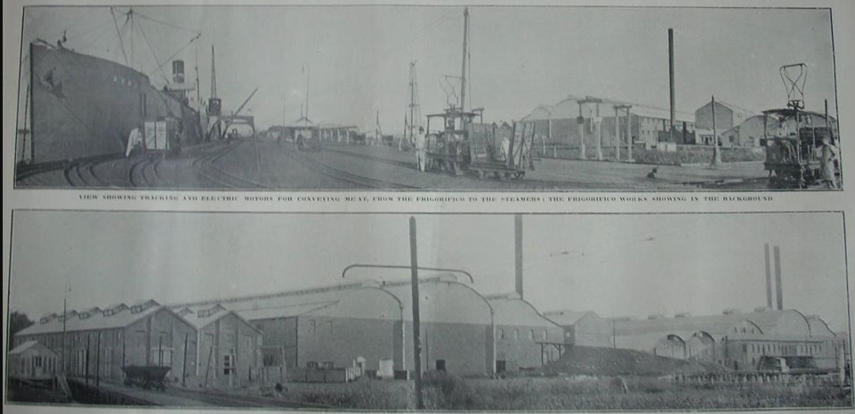 Frigorífico River Plate Fresh Meat Co - Campana - Argentina - Ca 1900. Imagen superior: muelle a la izquierda y frigorífico a la derecha. Imagen inferior: frigorífico